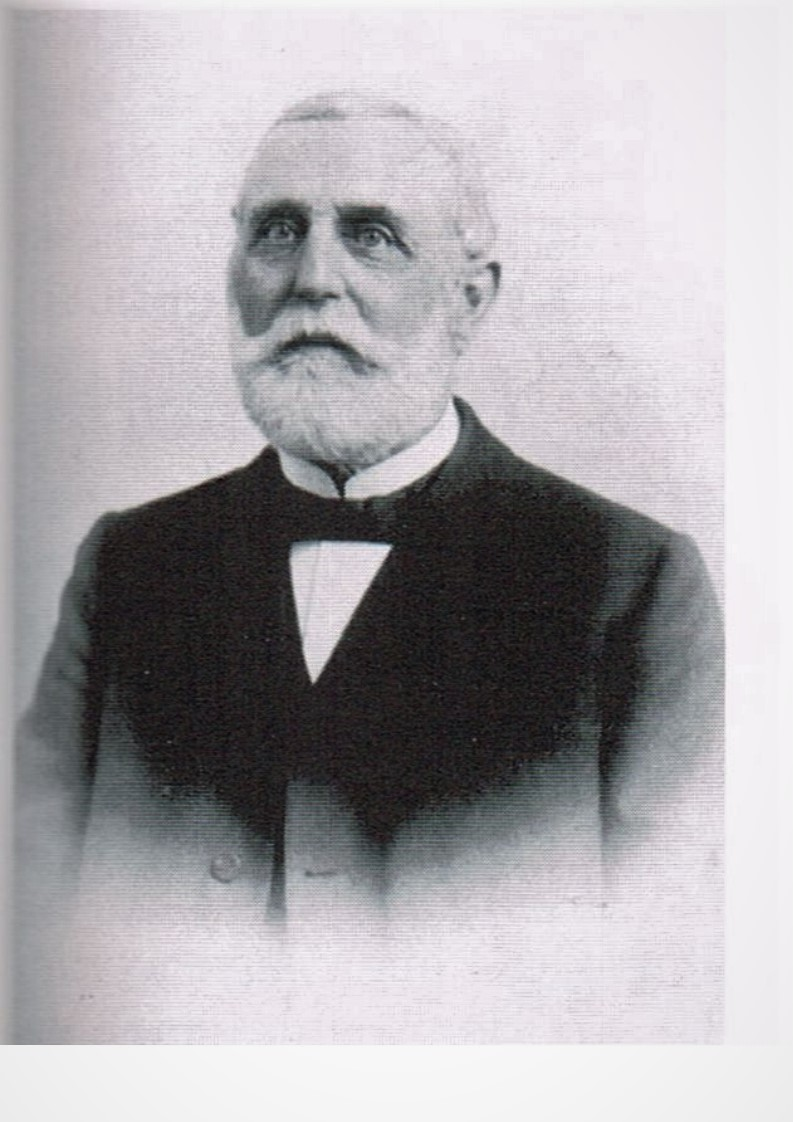 Friedrich Kirberg (getauft 20. August 1824; † 28. Februar 1914), 1840 Gründer der Maschinenfabrik Kirberg, ab 1866 Kirberg & Hüls, scan aus Wolfgang Wennig: Geschichte der Hildener Industrie Stadtarchiv Hilden 1974